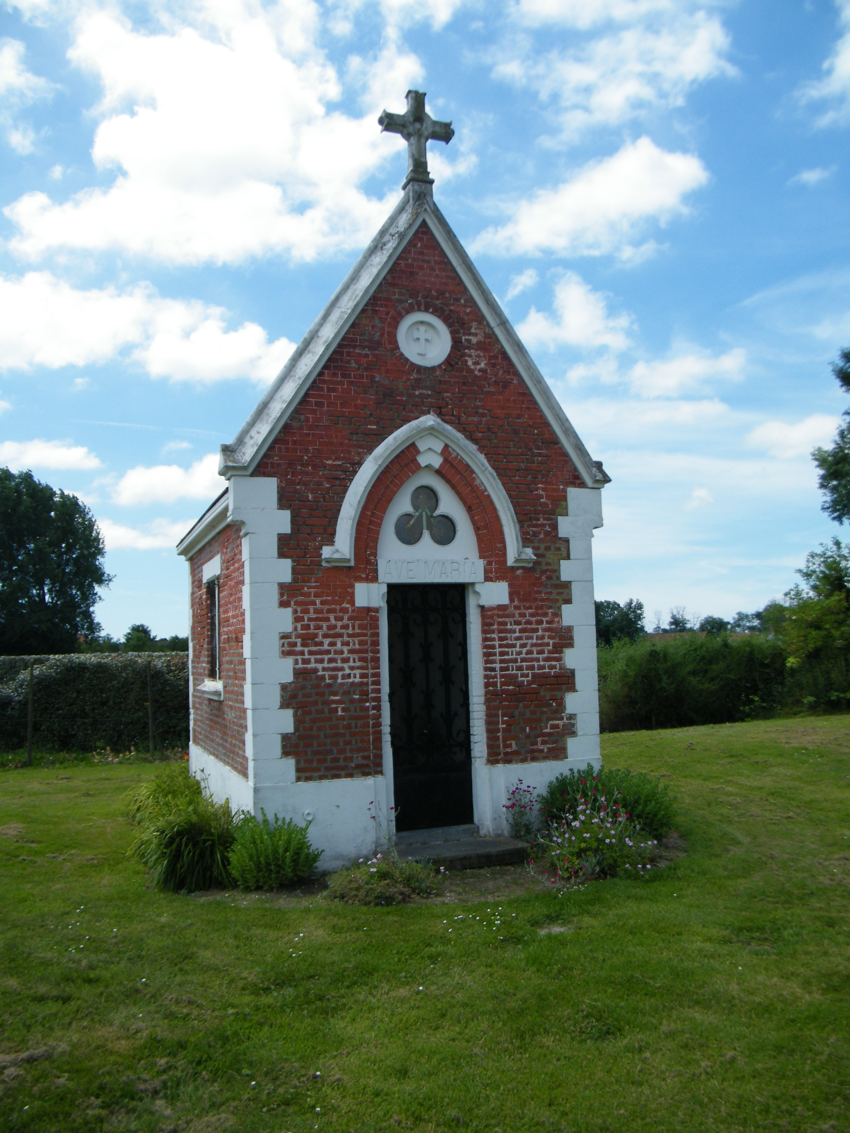 Chapelle à La Vierge, Villers-sur-Authie, Somme, France.